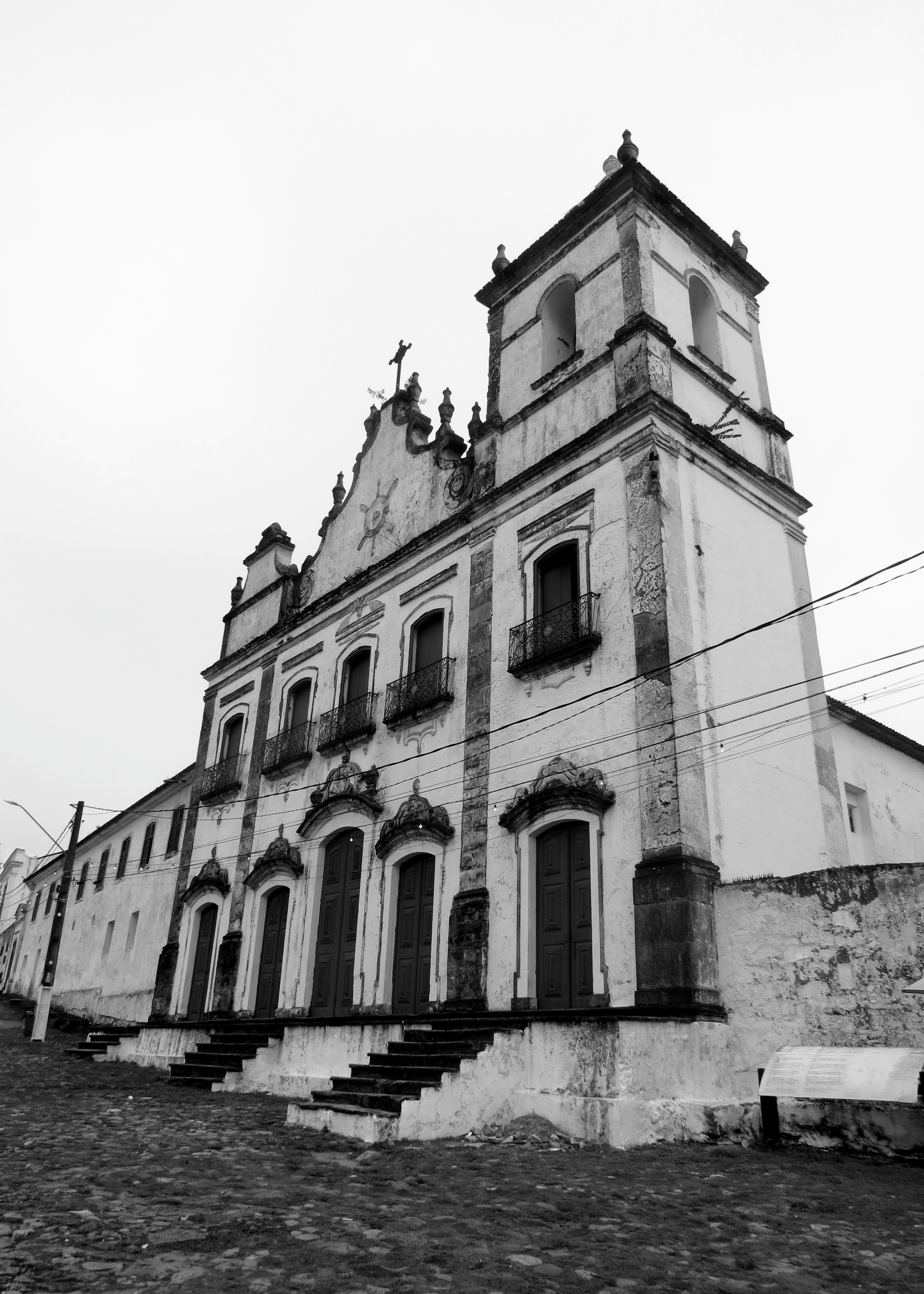 Igreja do Sagrado Coração de Jesus